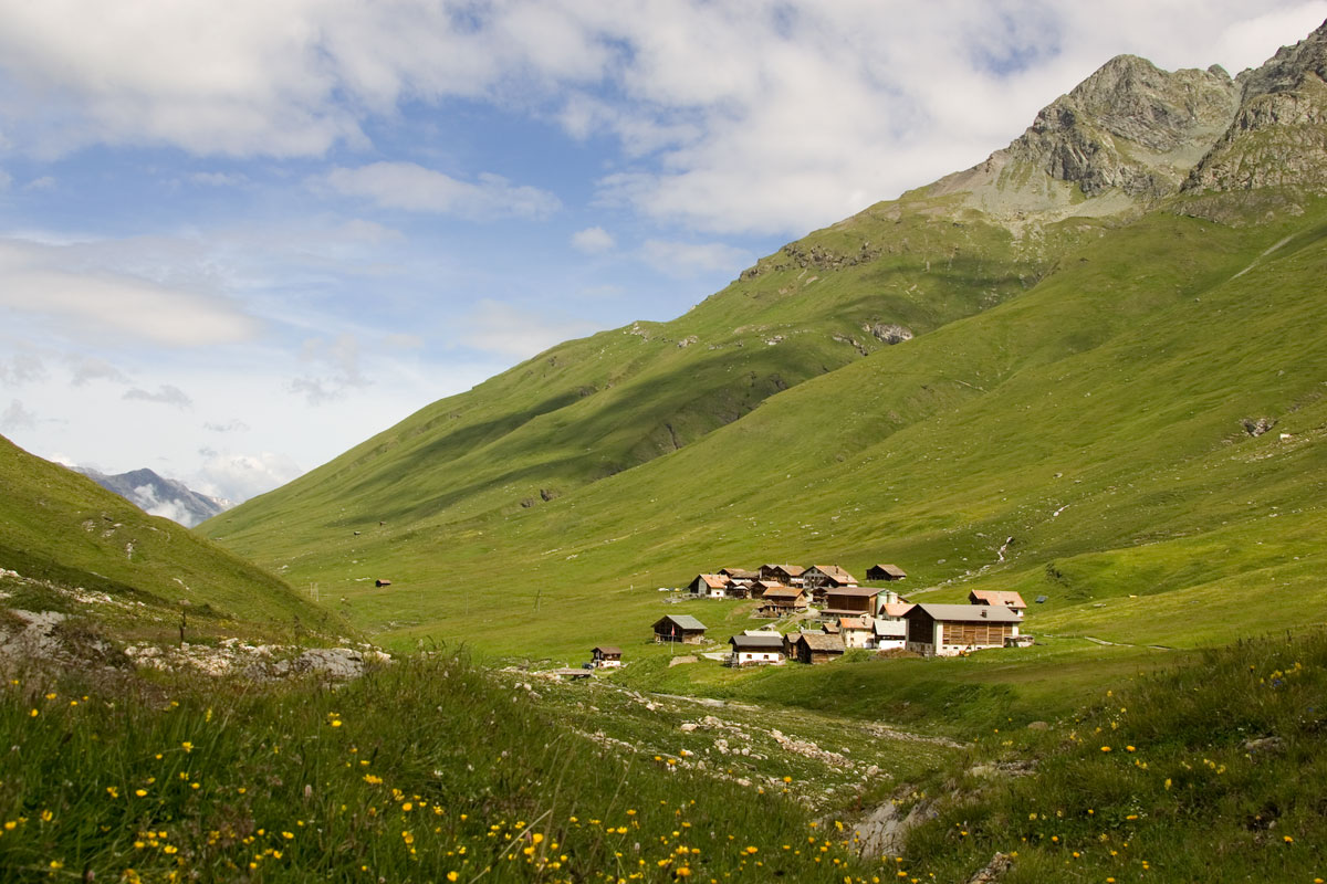 Juf im Avers-Tal